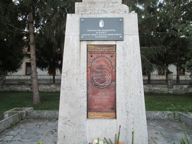 A szendrői Hősi emlékmű elülső emléktáblája.